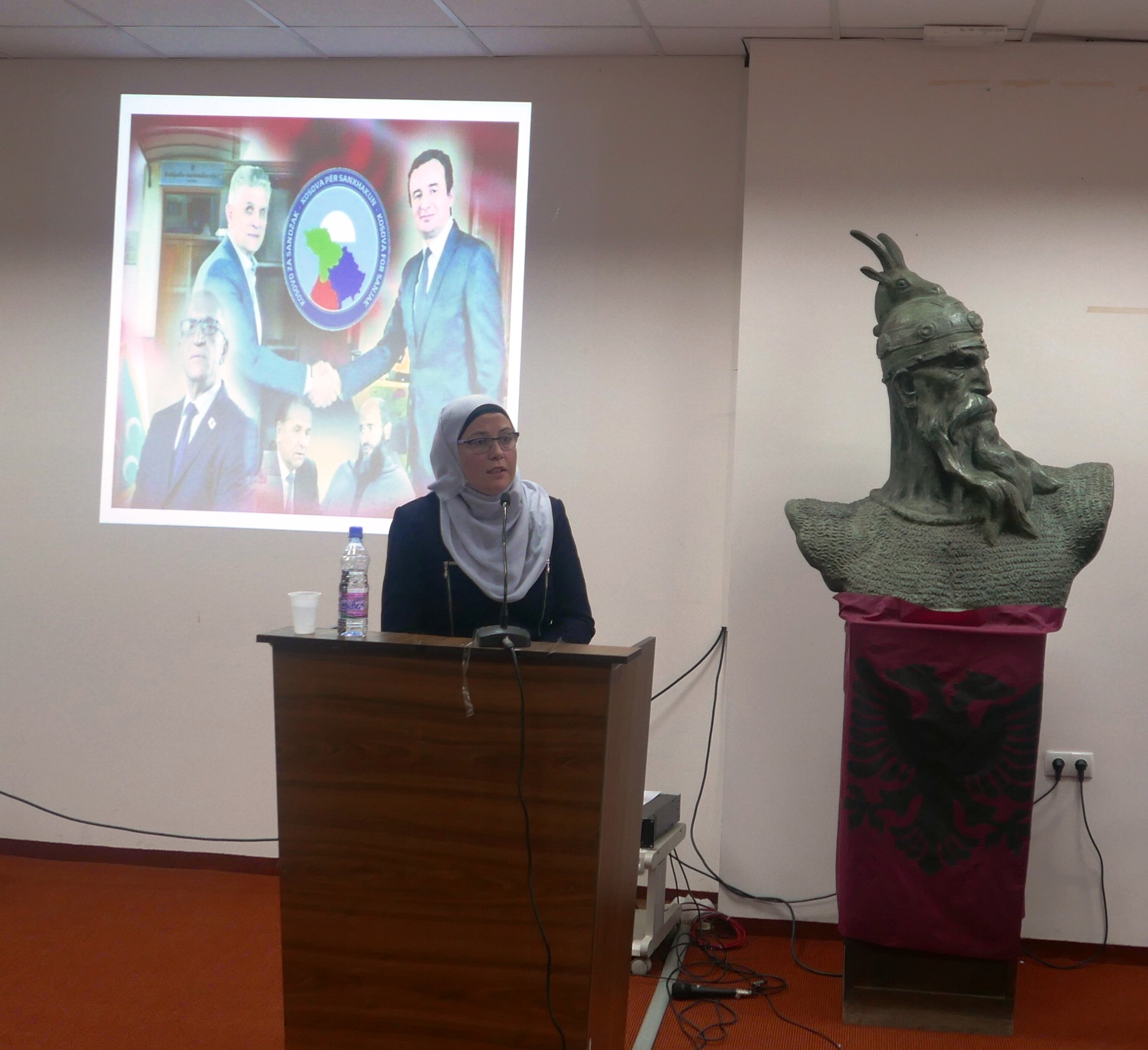 Në Kuvendin e II te shoqatës Kosova për Sanxhakun